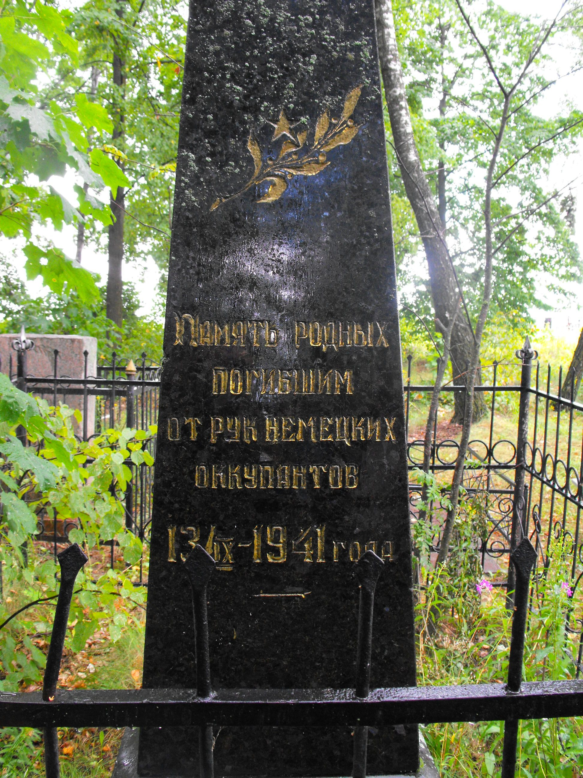 Памятник на еврейском кладбище Смолевич на месте перезахоронения части останков убитых нацистами и их пособниками осенью 1941 года евреев - узников Смолевичского гетто.